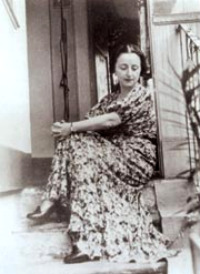 Maria Assunta Giulia Volpi Nannipieri, detta Mura